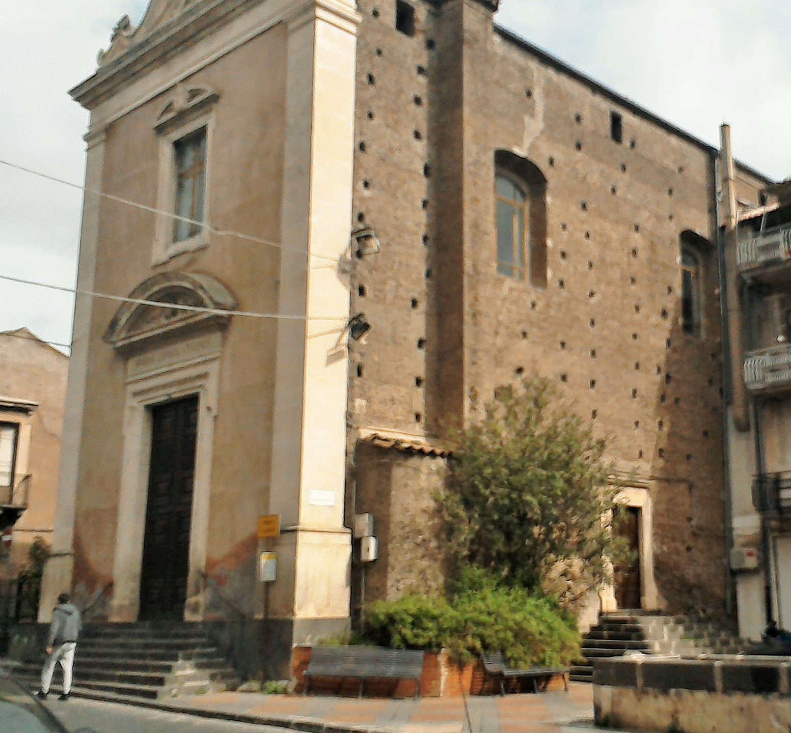 La chiesa di Santa Lucia - Misterbianco